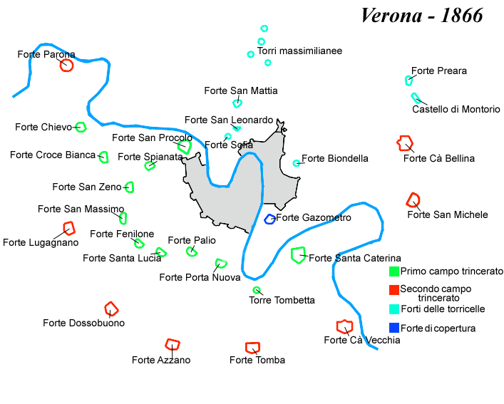 Cartine riguardante la cinta magistrale ed i forti distaccati di Verona